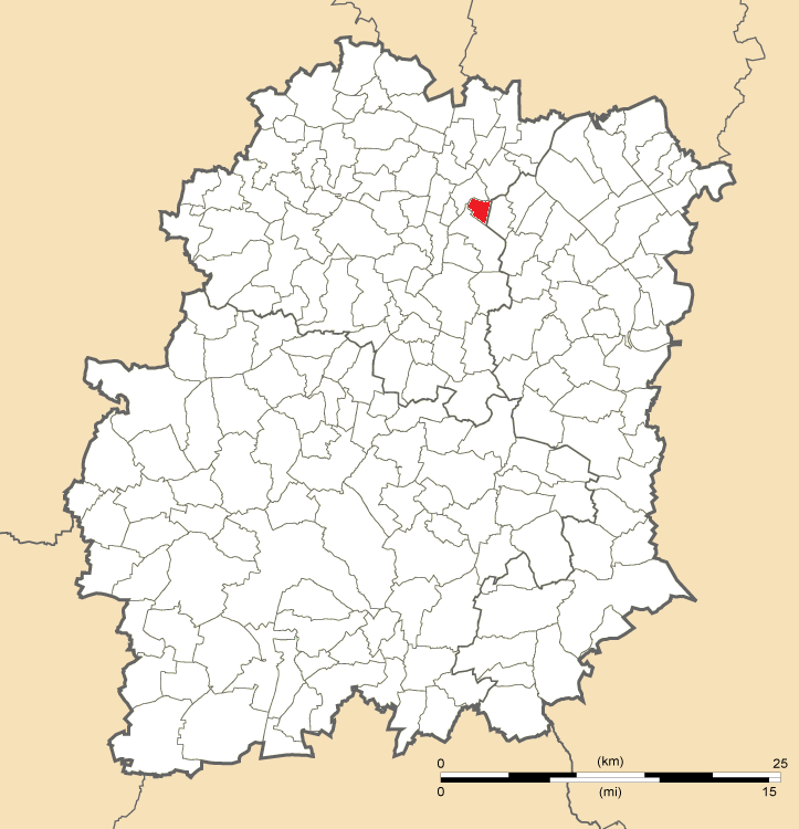 Carte de position de Villemoisson-sur-Orge en Essonne (91)